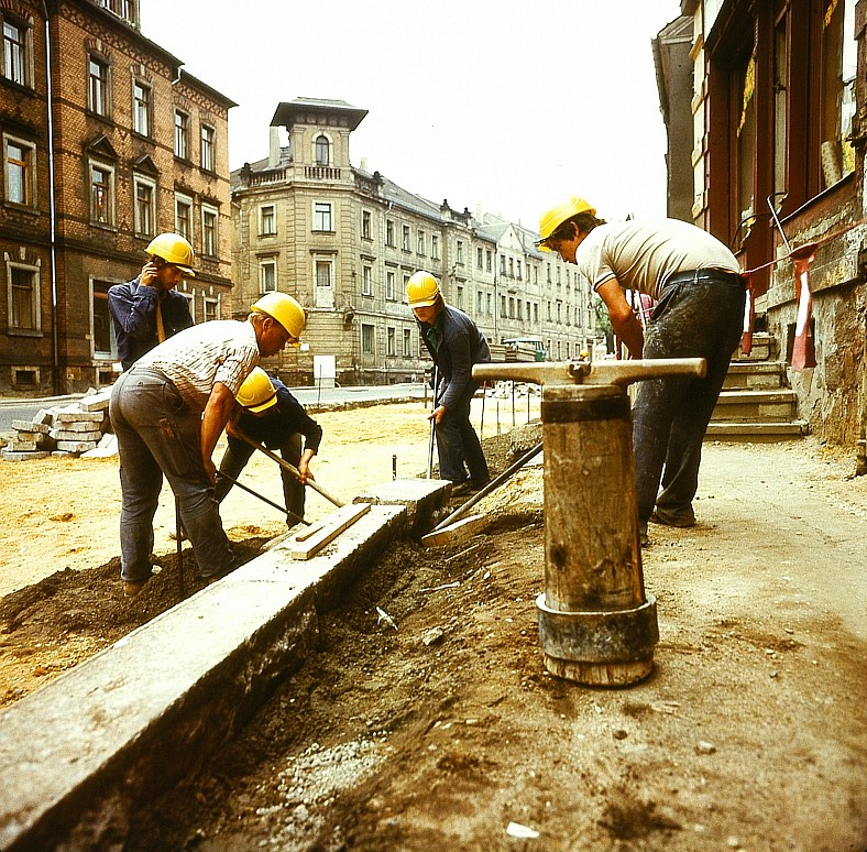 Original image description from the Deutsche FotothekStraßenbauer